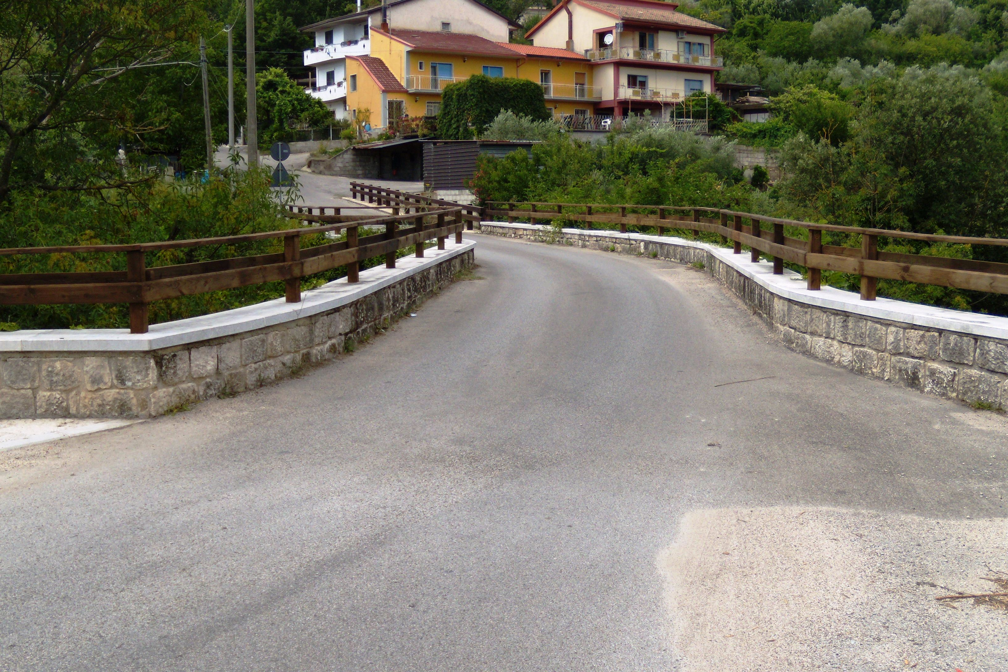 Il ponte di San Giovanni in Cerreto Sannita (Benevento). Questo ponte è legato alla leggenda della "'Nzilla", una giovane e bella donna che la notte tra il 23 e il 24 giugno di ogni anno farebbe la sua apparizione su di esso. Secondo la leggenda la giovane, vestita di soffici veli, danzerebbe per ore ed ore sul ponte e nel piazzale adiacente la cappella di San Giovanni. La "'Nzilla" (che in dialetto cerretese significa ammaliatrice o zitella) simboleggia Salomè, figlia di Erodiade e di Erode Filippo, che con il suo fascino e con la sua danza conquistò le grazie del re di Giudea Erode Antipa. Questi, appagato dalla esibizione di Salomè, giurò di darle in premio ciò che ella avesse voluto, "fosse anche la metà del mio regno". La ragazza, istigata dalla madre, chiese che le fosse portata su un piatto d'argento la testa di Giovanni Battista: Erode, per non venire meno al giuramento fatto davanti ai commensali, acconsentì e mandò a decapitare Giovanni.